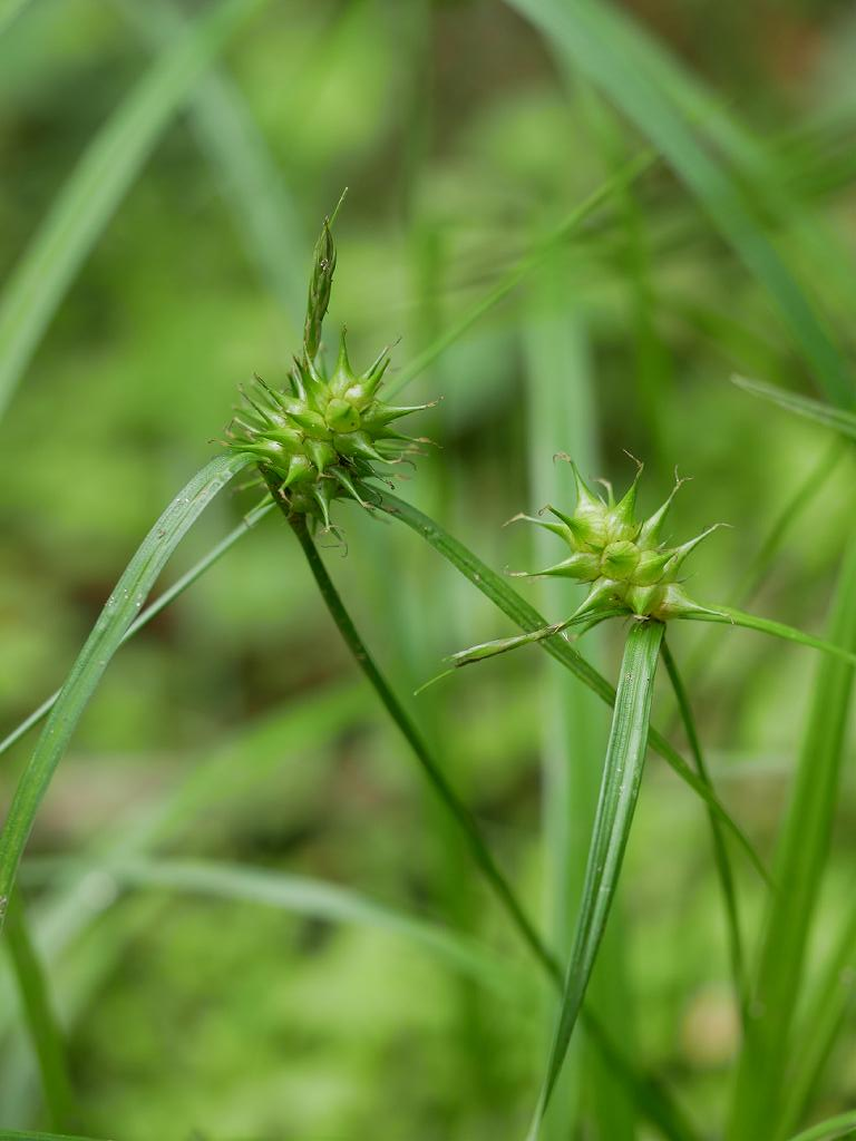 2019/07/08 奈良県：Nara Pref., Japan